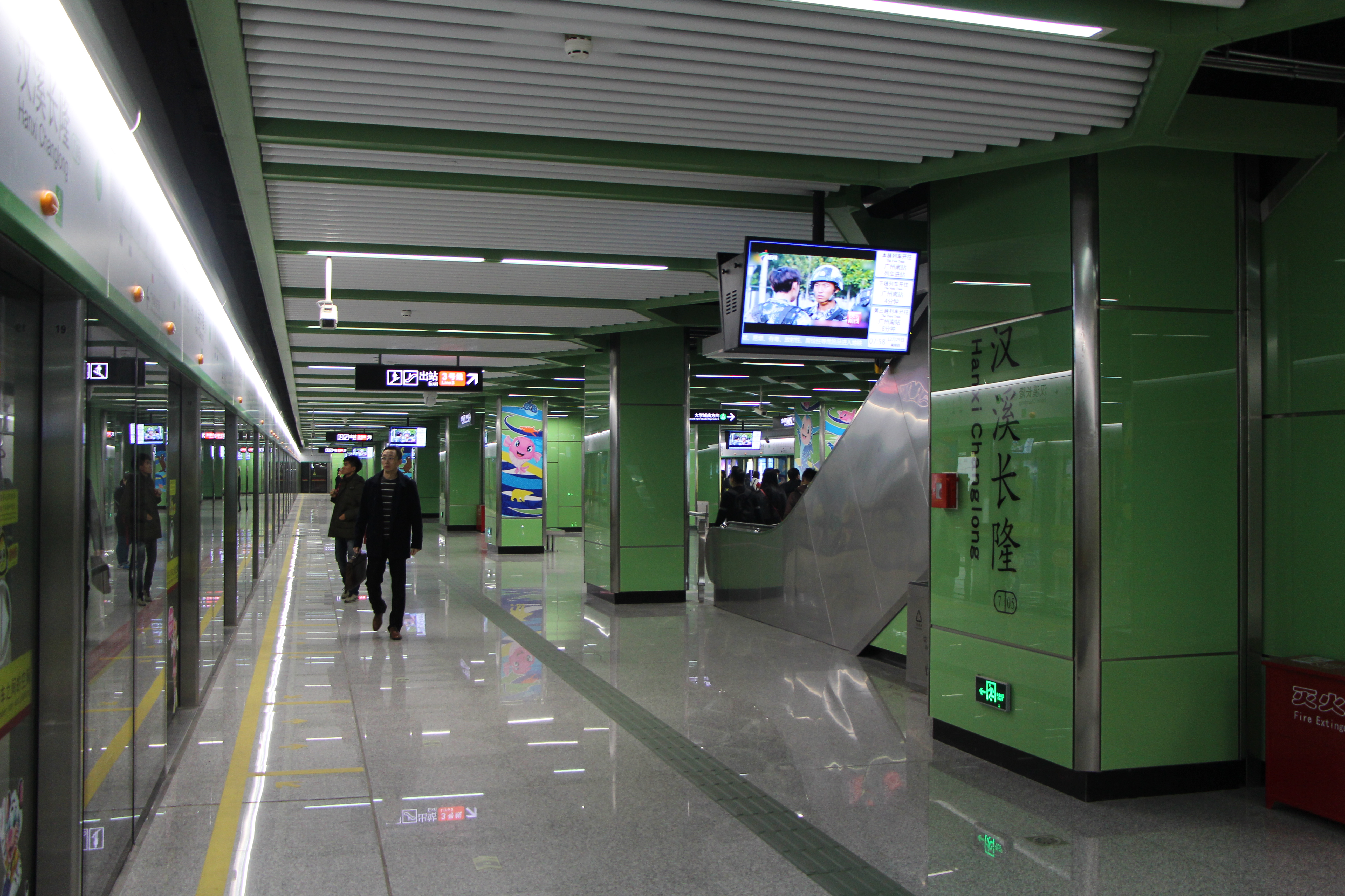 广州地铁汉溪长隆站